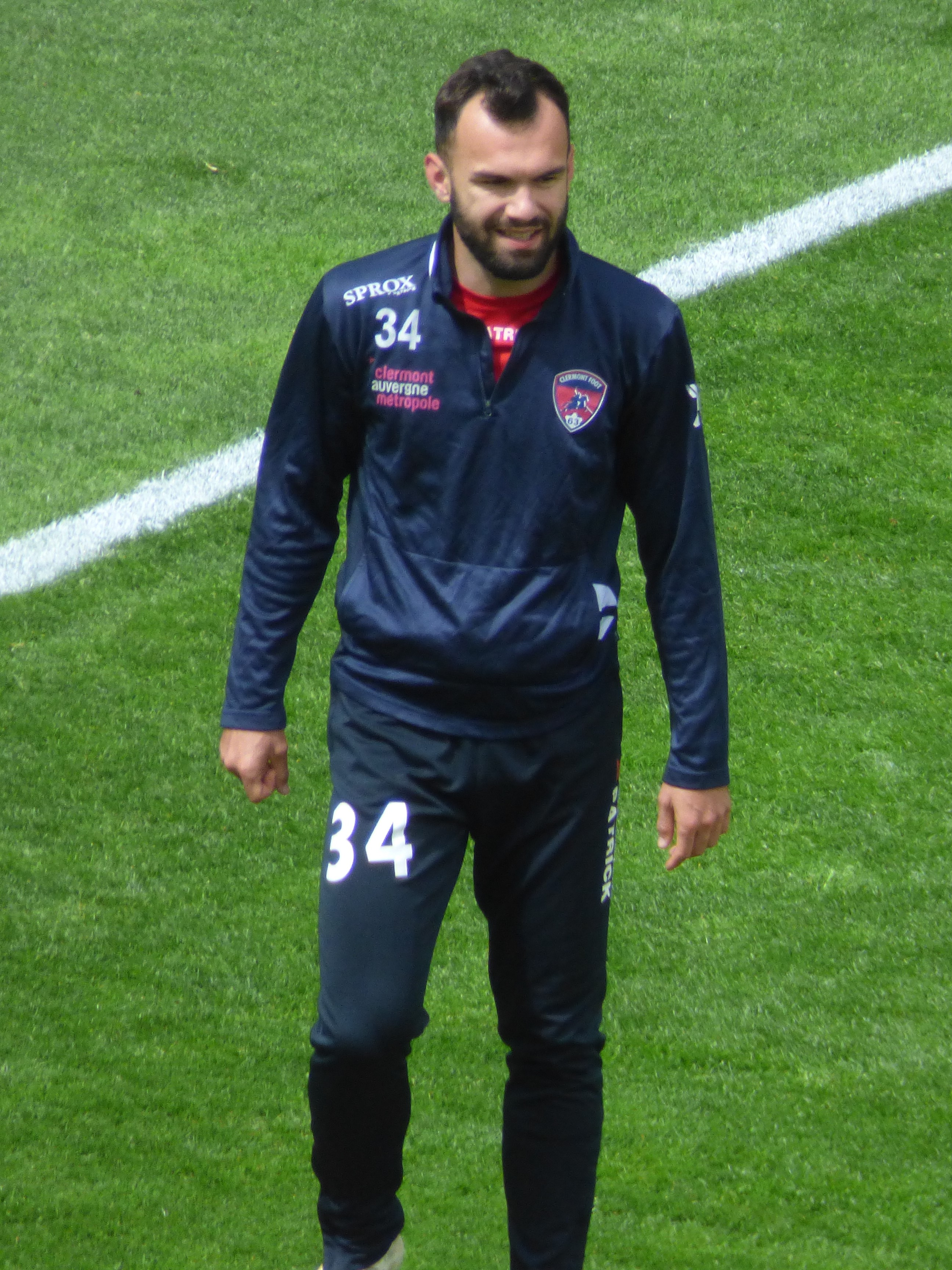 Cantyn Chastang avant le match RC Lens / Clermont Foot 63, comptant pour la 36ème journée du championnat de France de football de Ligue 2 2018-2019, le 4 mai 2019, au stade Bollaert-Delelis.